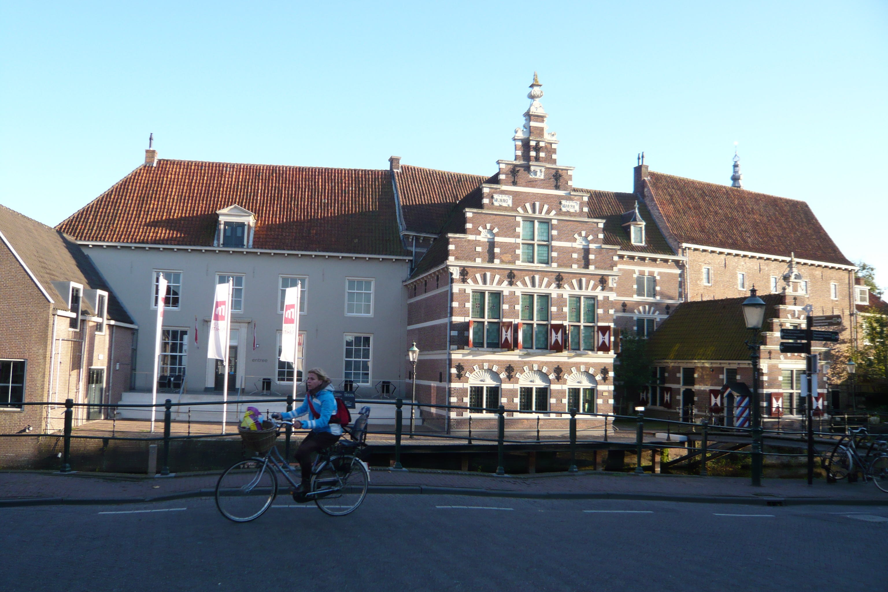 Flehite Museum Amersfoort